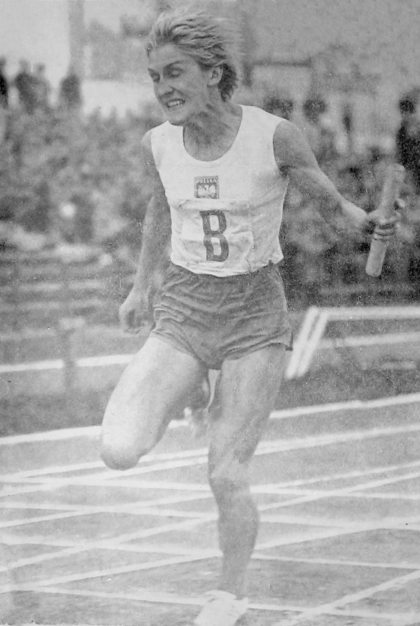 Ewa Kłobukowska na mecie sztafety 4×100 metrów, 1964